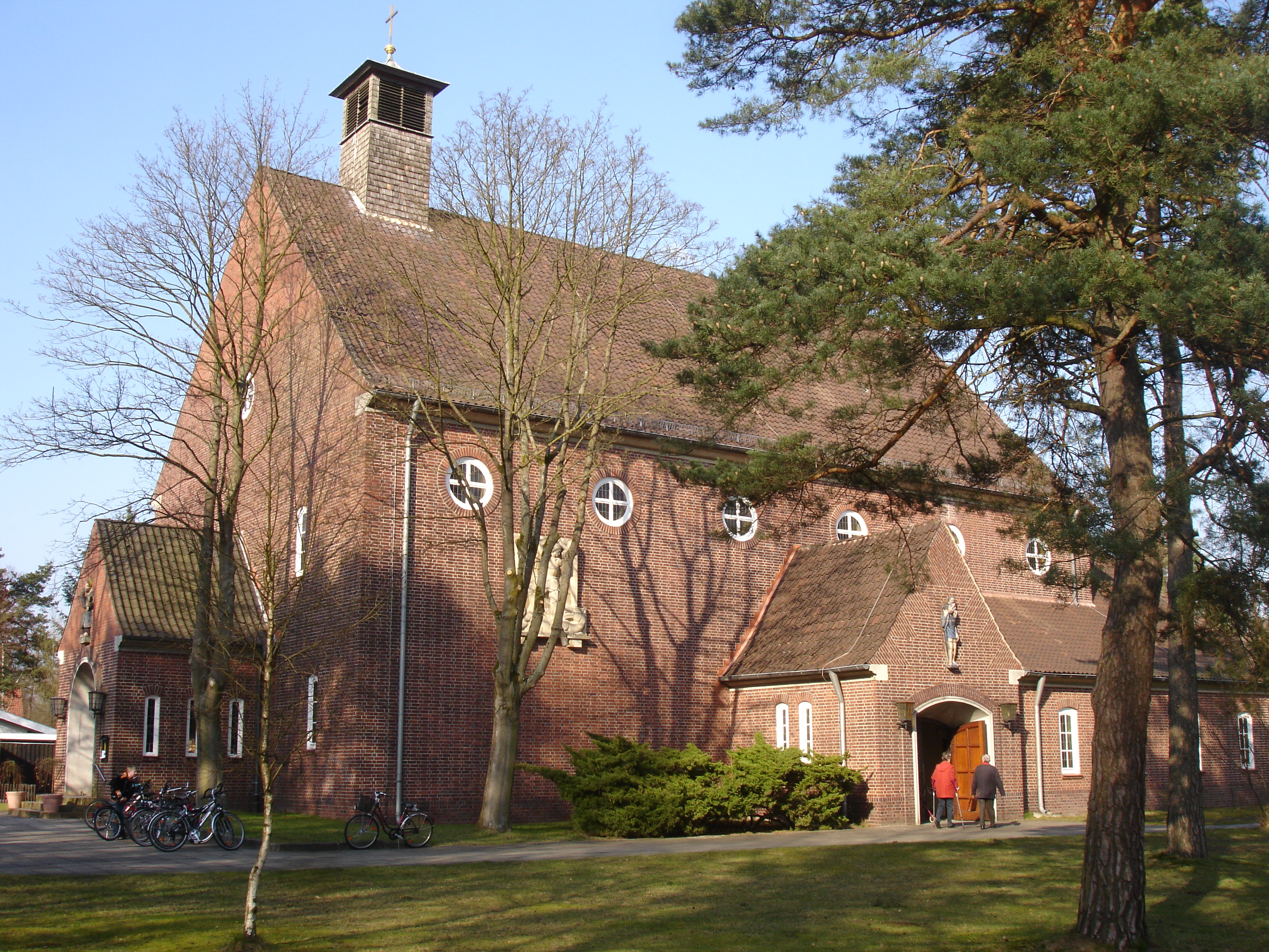 Fassberg Kirche Gesamtansicht von SW 25. März 2007